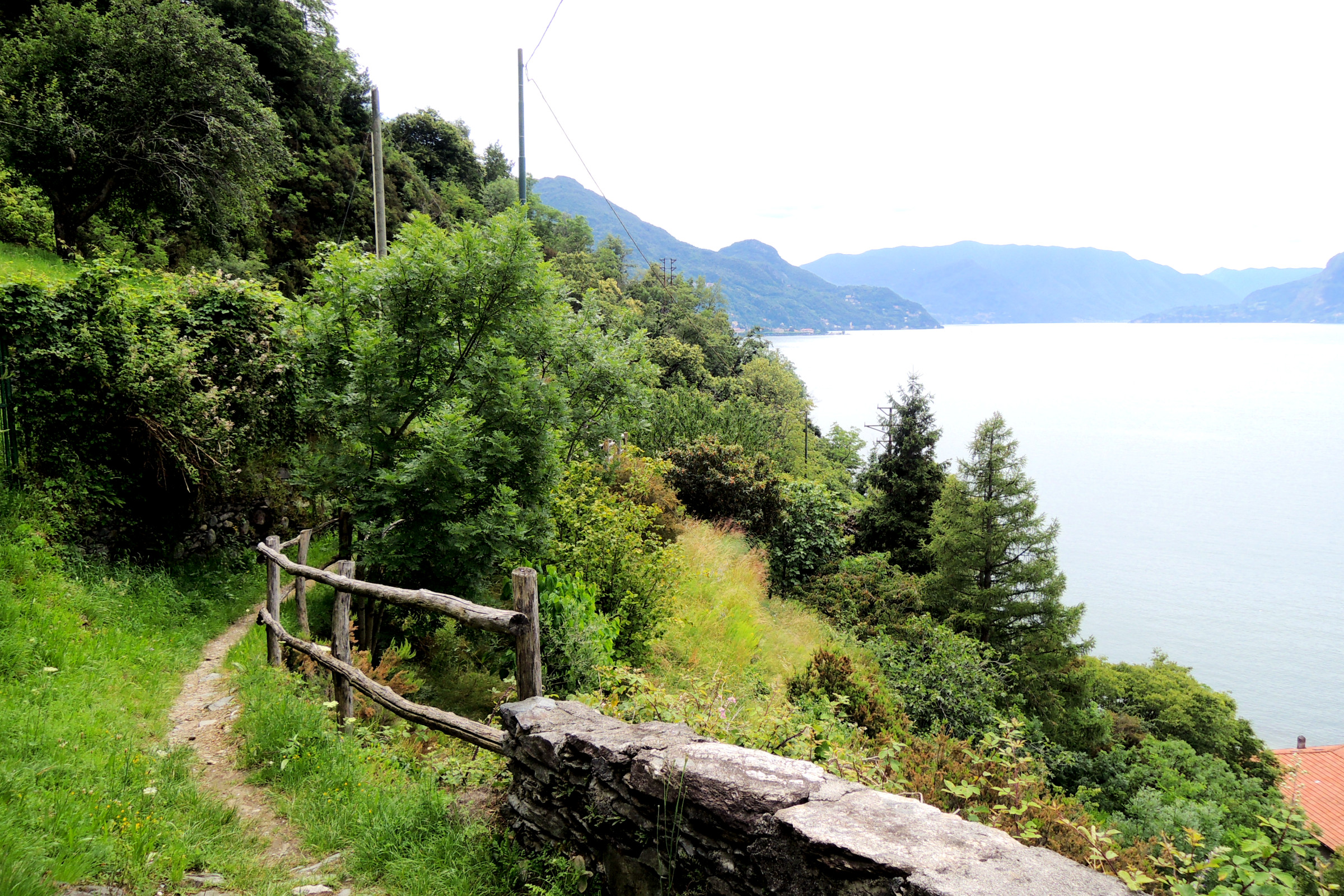 Tratto del sentiero del viandante nel territorio di Dervio. Lago di Como, Italia.